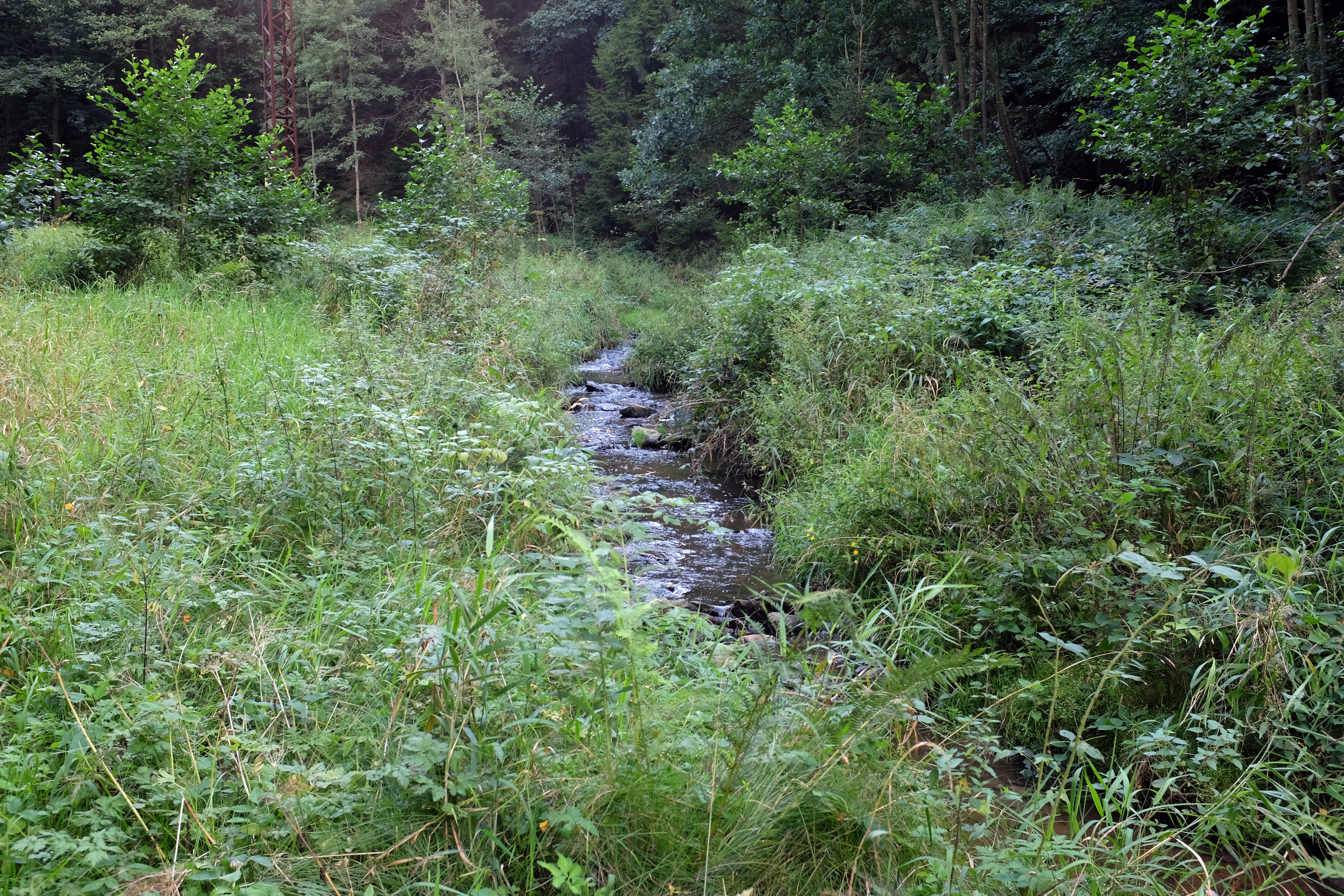 Bahnitý potok, přítok Kosového potoka, u obce Vaty, okres Cheb